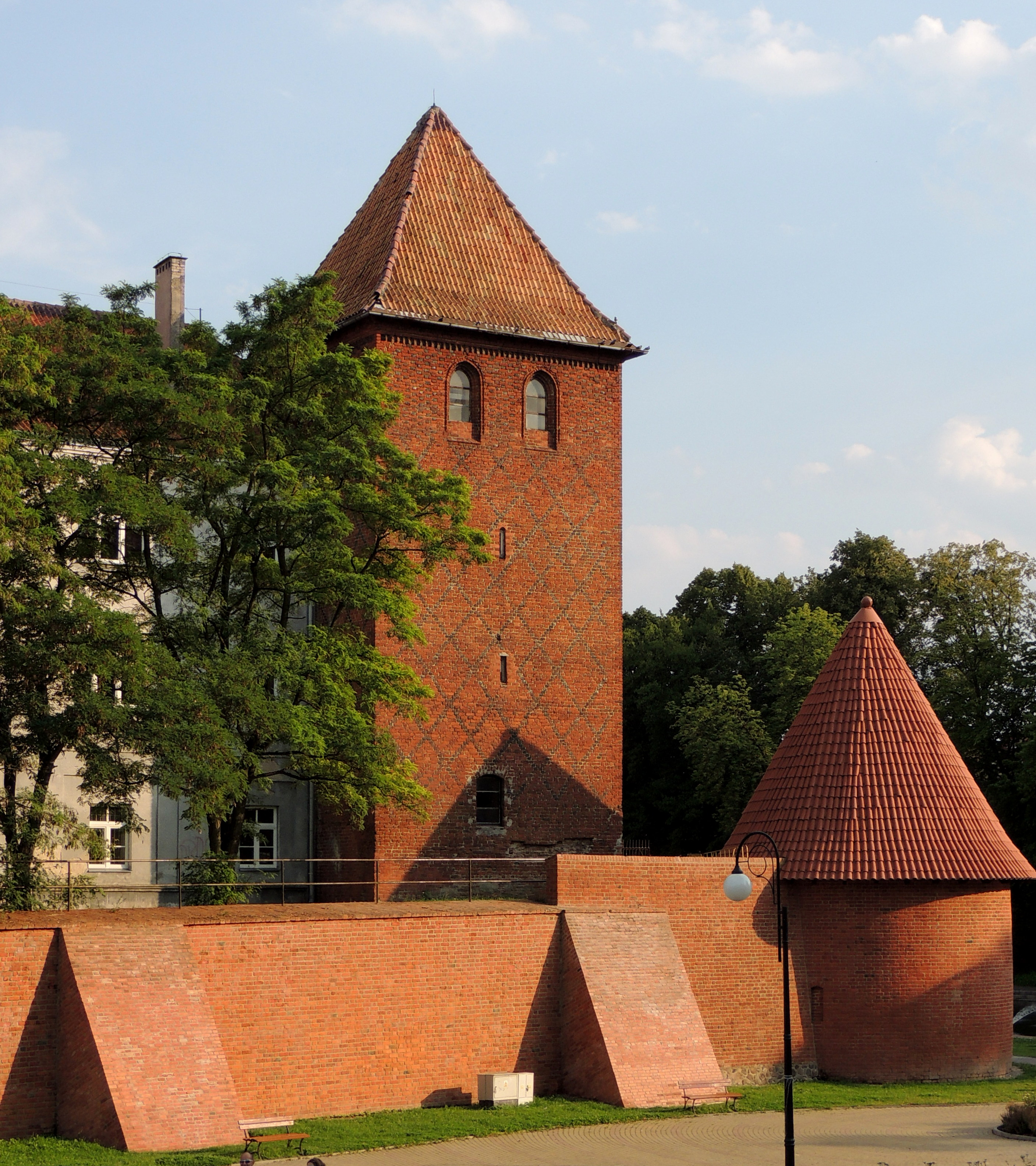 Braniewo, wieża, XIV